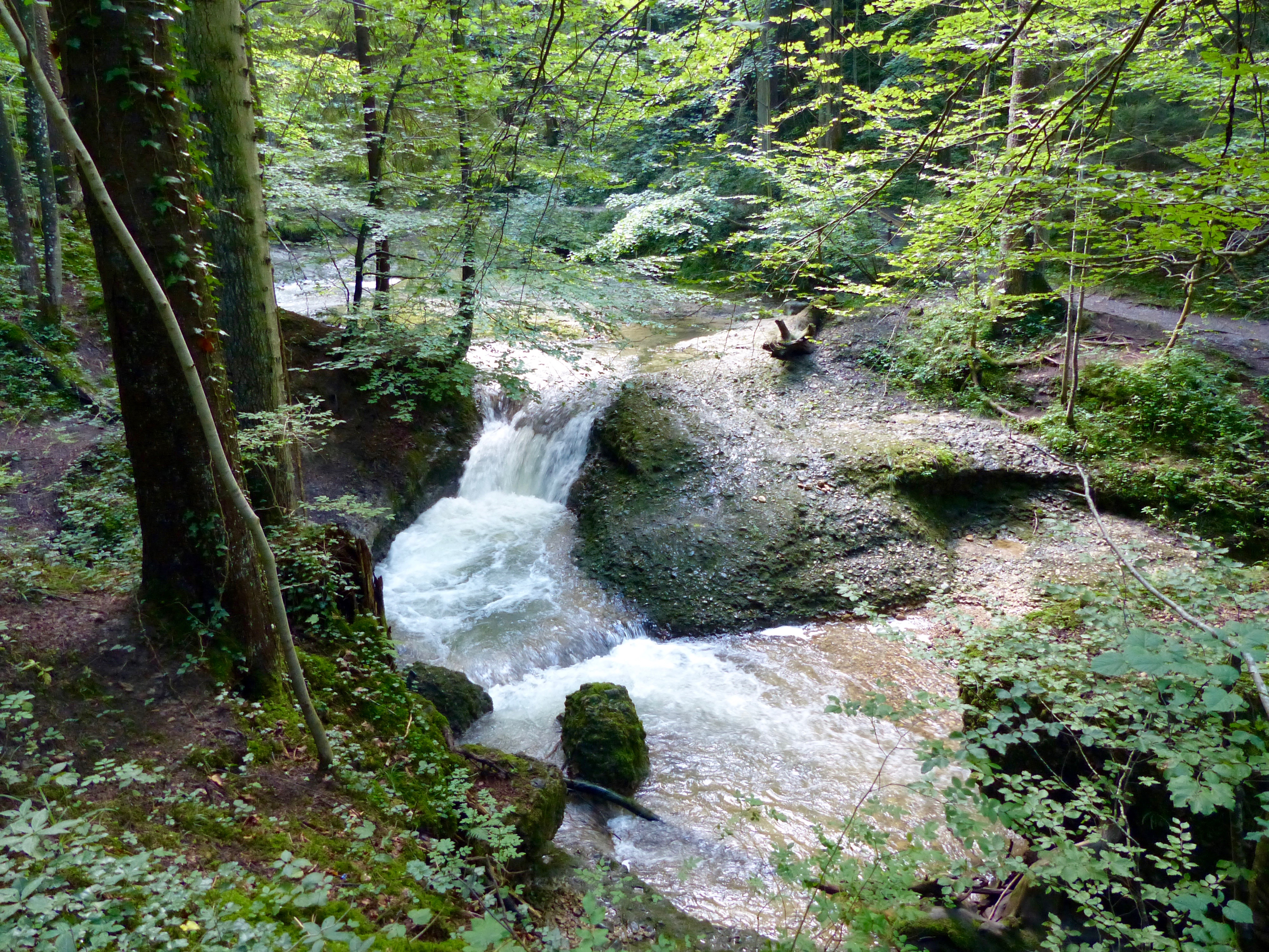 WikiProjekt Landstreicher Geotop Scheidegger Wasserfälle